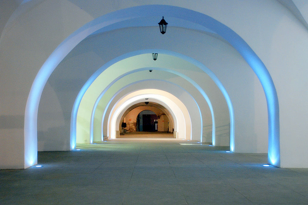 Krośnieńskie podcienia nocą. Autorem zdjęcia jest Przemysław Niepokój-Hepnar